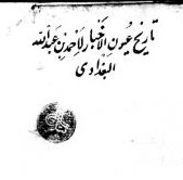 صورة العنوان